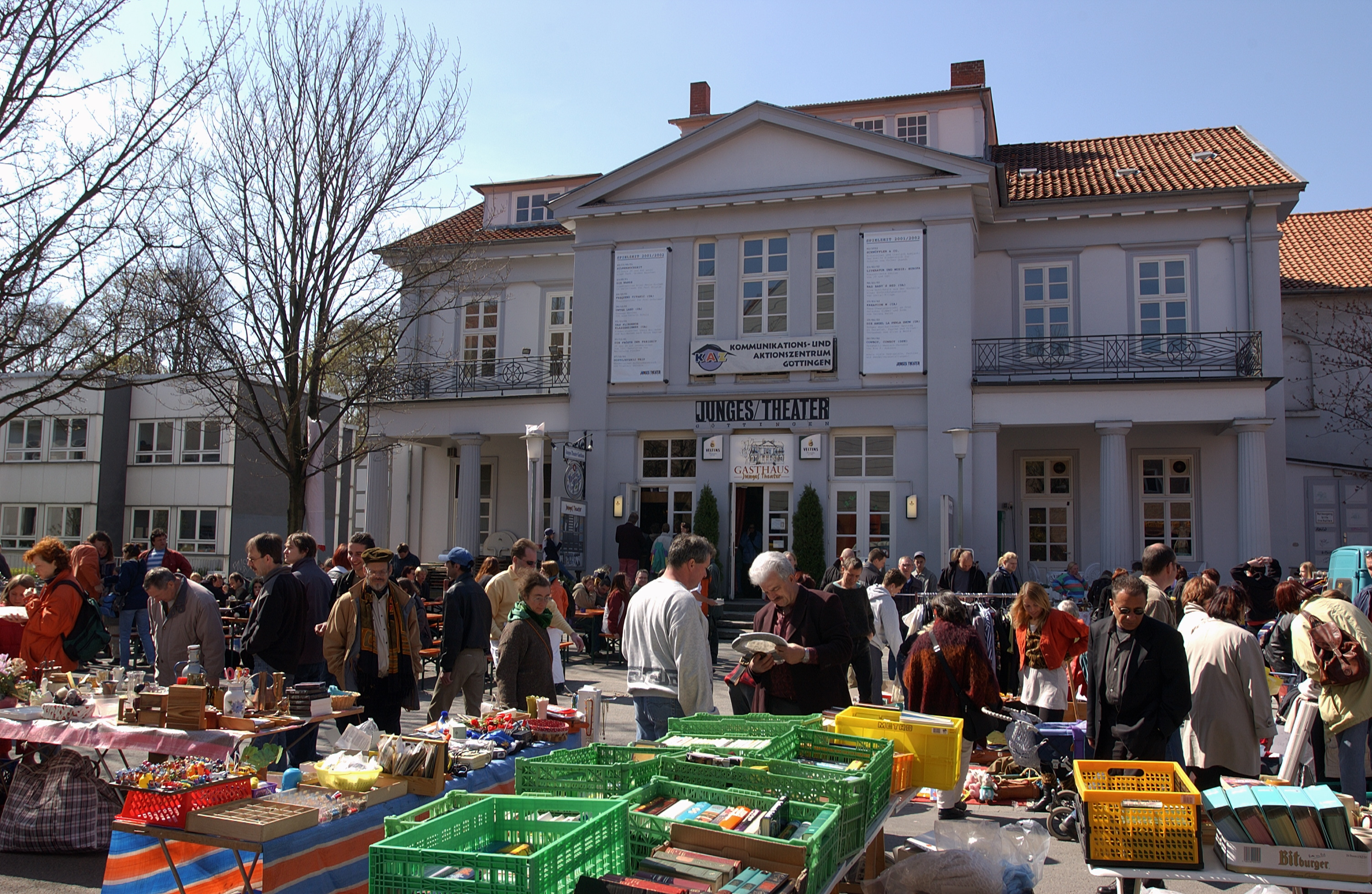 Goettingen, Wochenmarkt